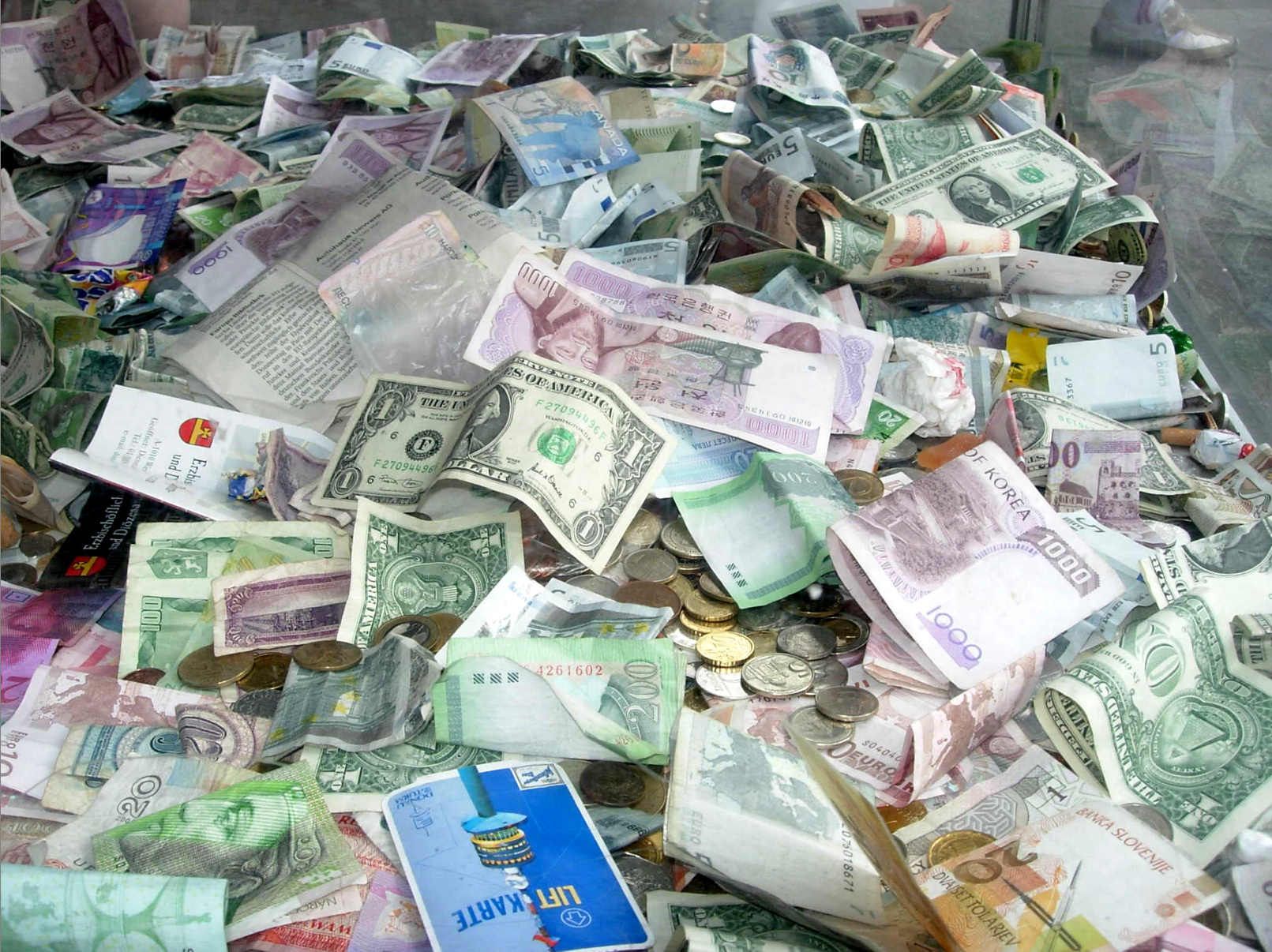 Bécs 010